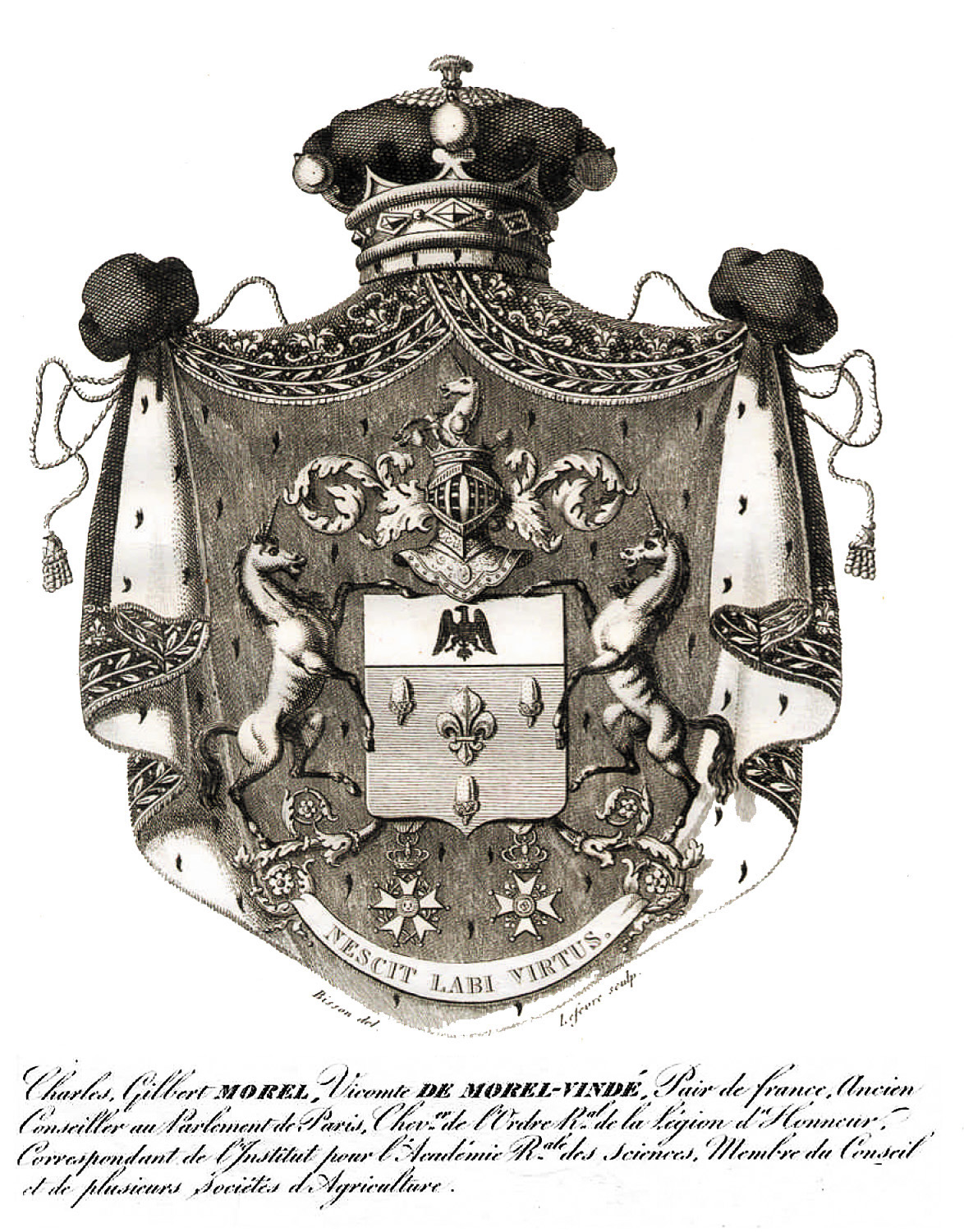 Blason du vicomte Charles Gilbert Morel de Vindé (né le 20 janvier 1759 à Paris où il est mort le 19 décembre 1842). "Nescrit labi virtus" = "Le devoir ne peut se dérober"